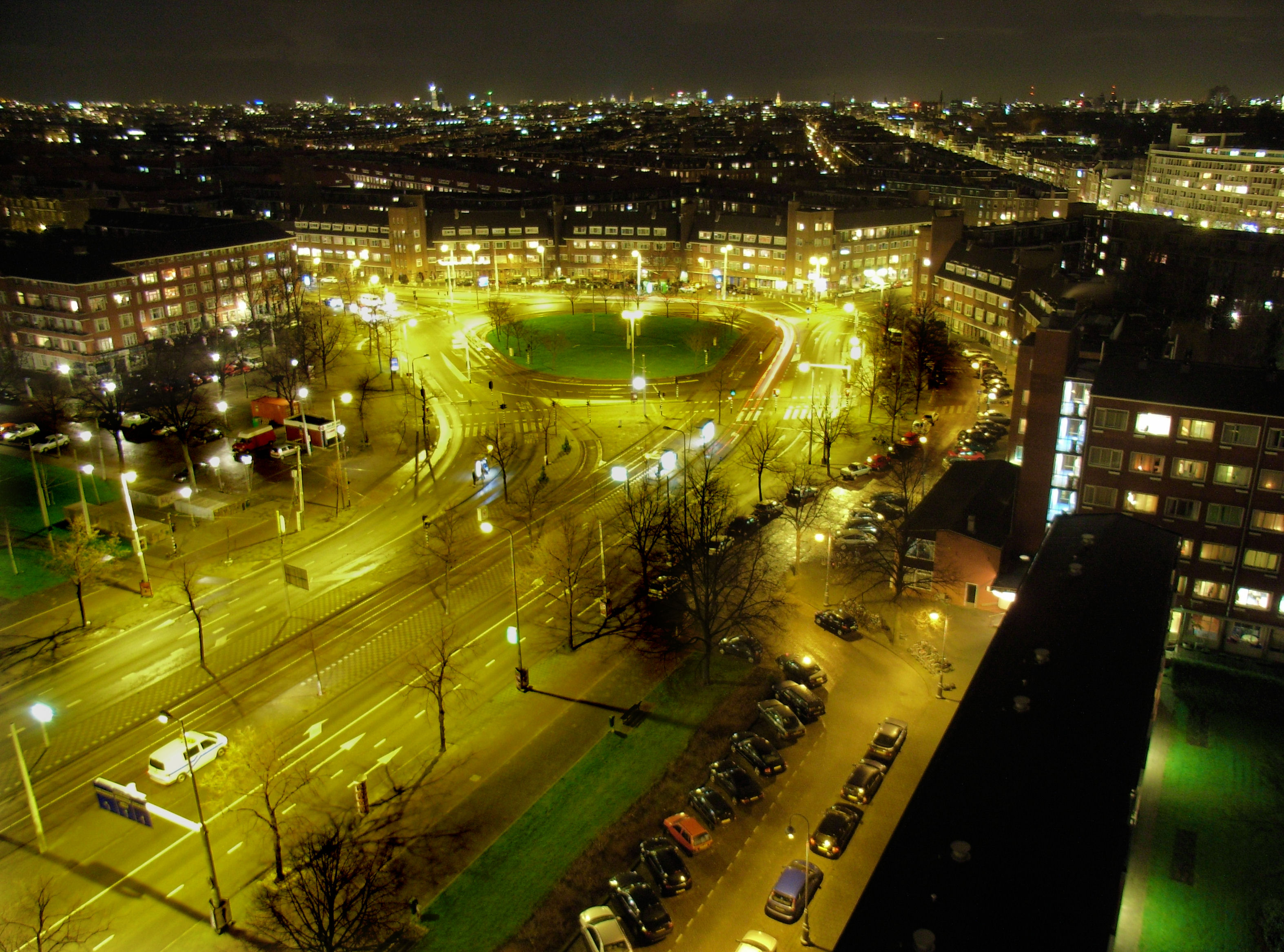 Surinameplein gezien vanaf gebouw de Klokkenhof